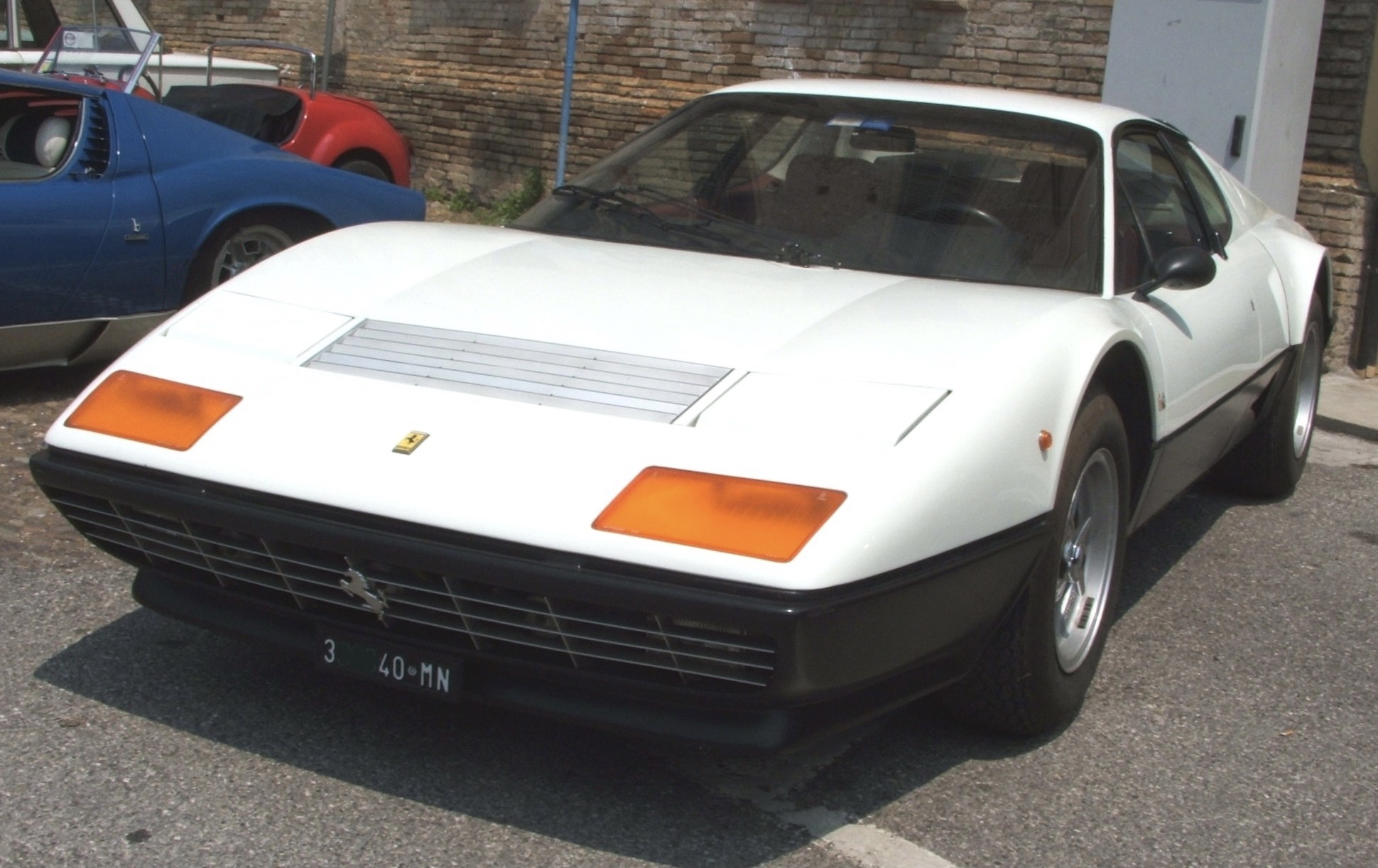 Ferrari 512 Berlinetta Boxer del 1976 fotografato al Raduno Auto Storiche di Medole nel 2007